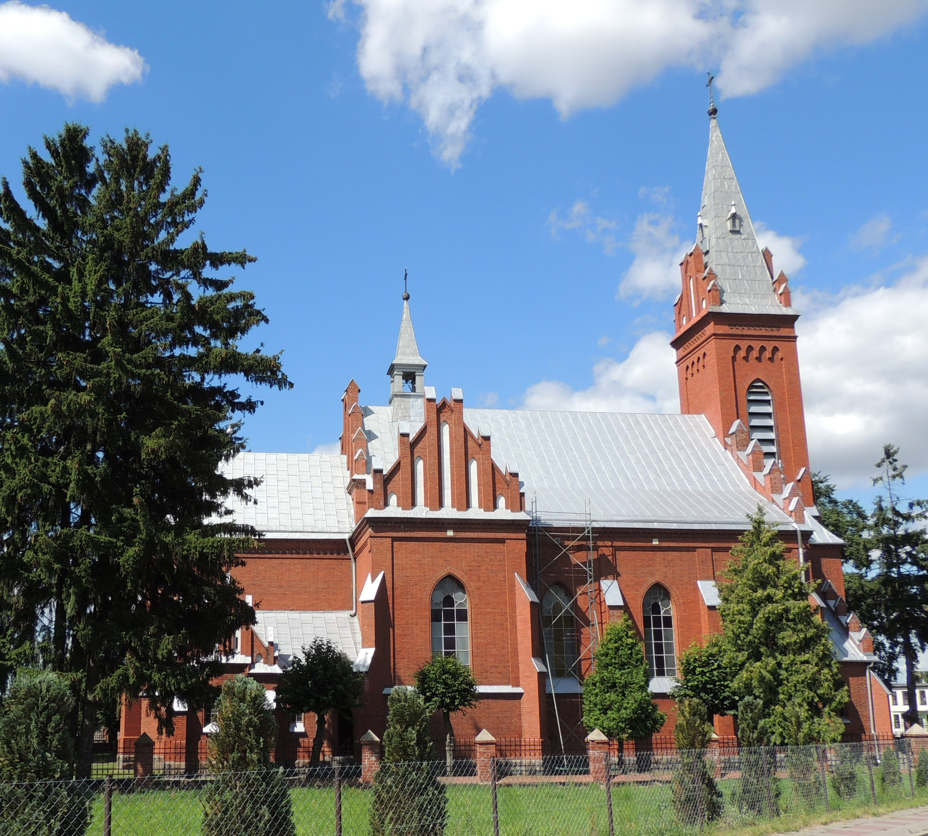 Dalików - kościół parafialny pw. św. Mateusza, 1908-1913